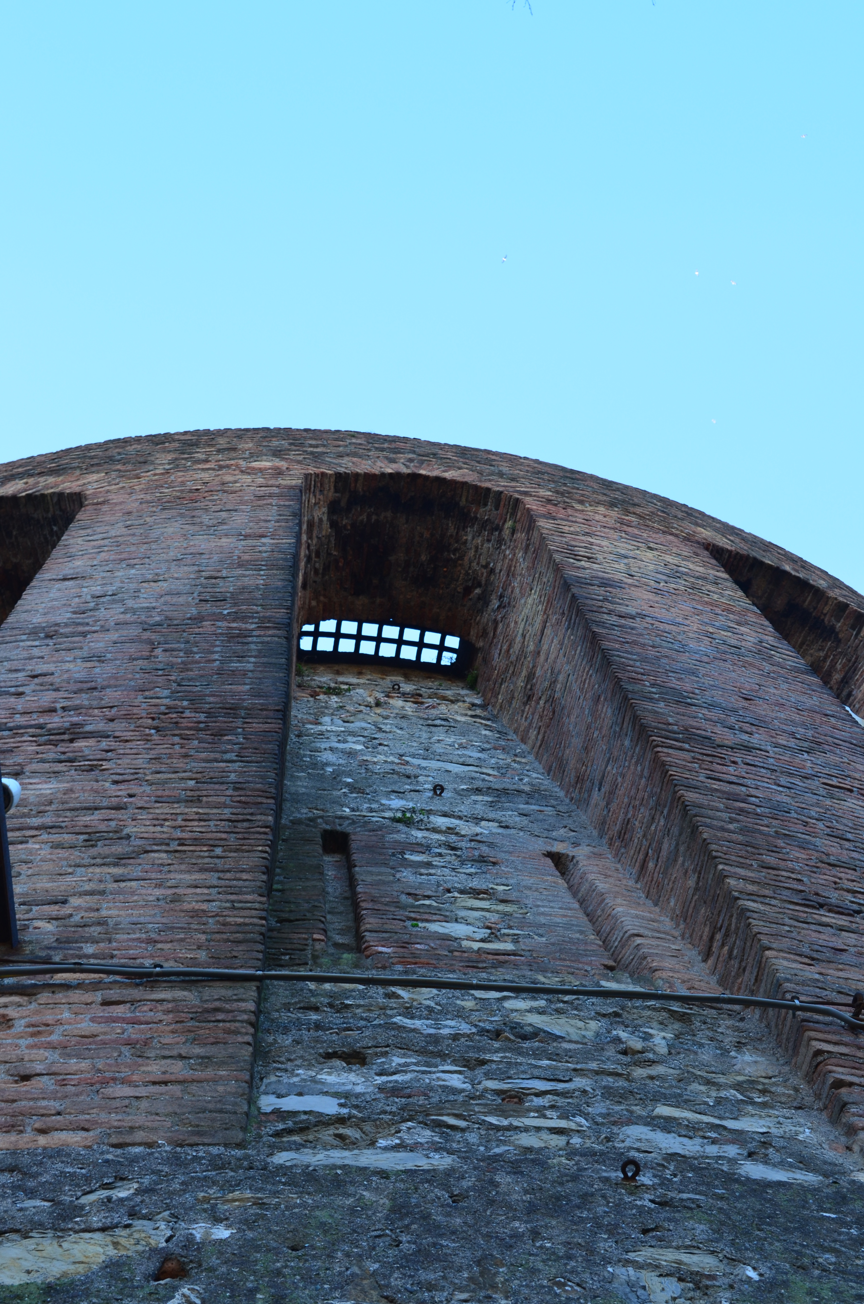 Paraste con caditoia nella Torre San Bernardino